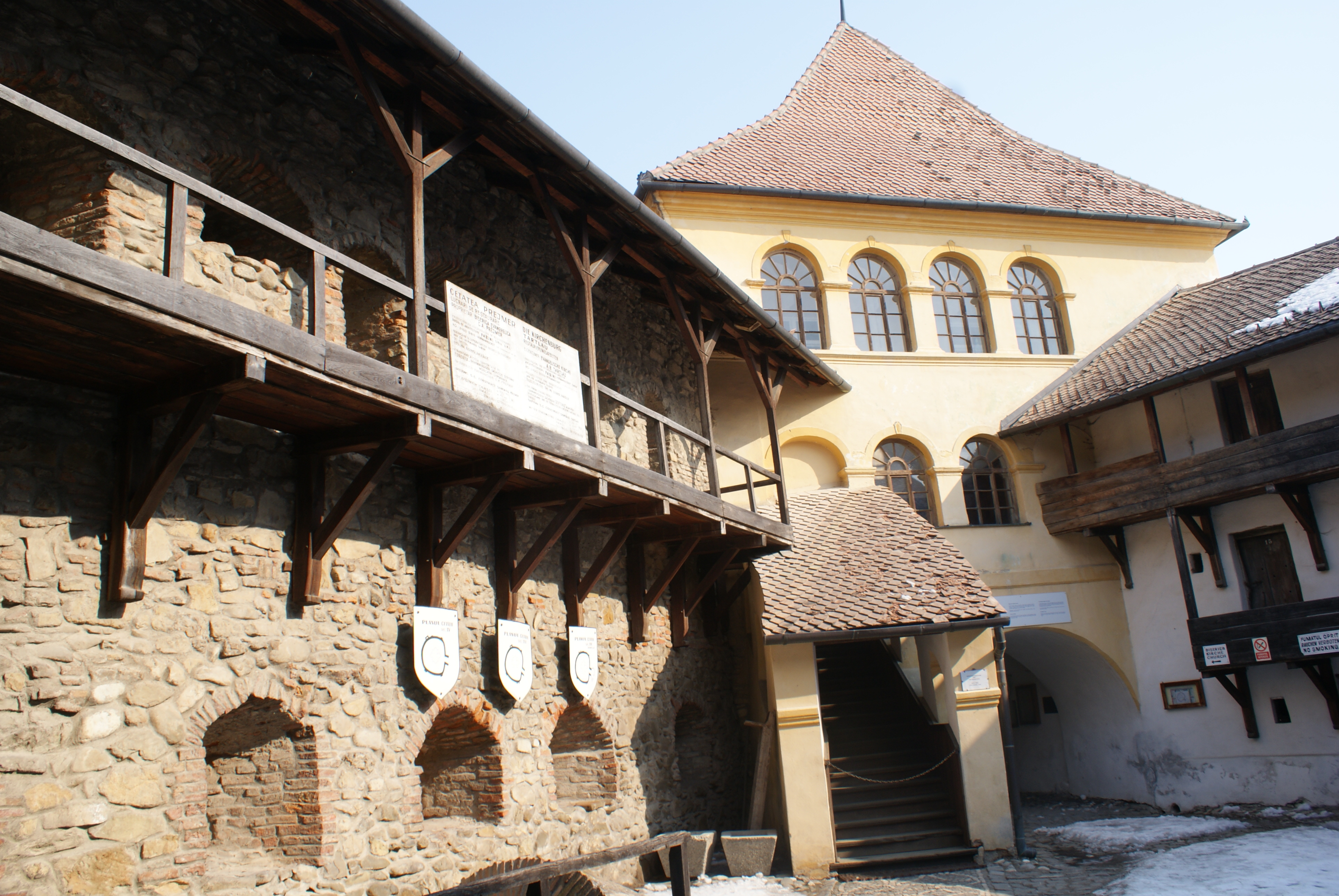 Zwinger (curtea brutarilor), anexe 05